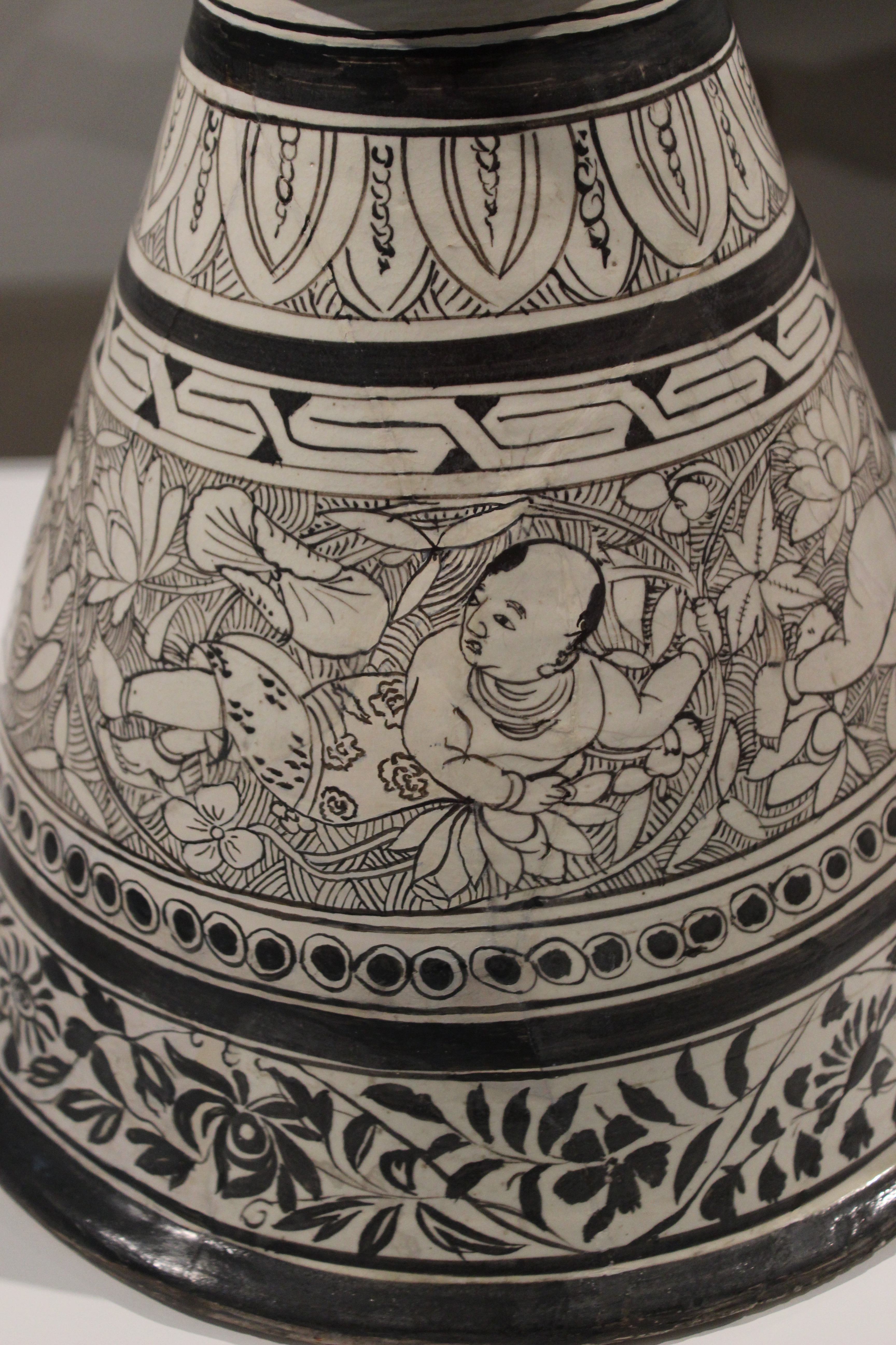 Seattle Asian Art Museum. Jarrón de cerámica de Cizhou, China, ss. XII-XIII.